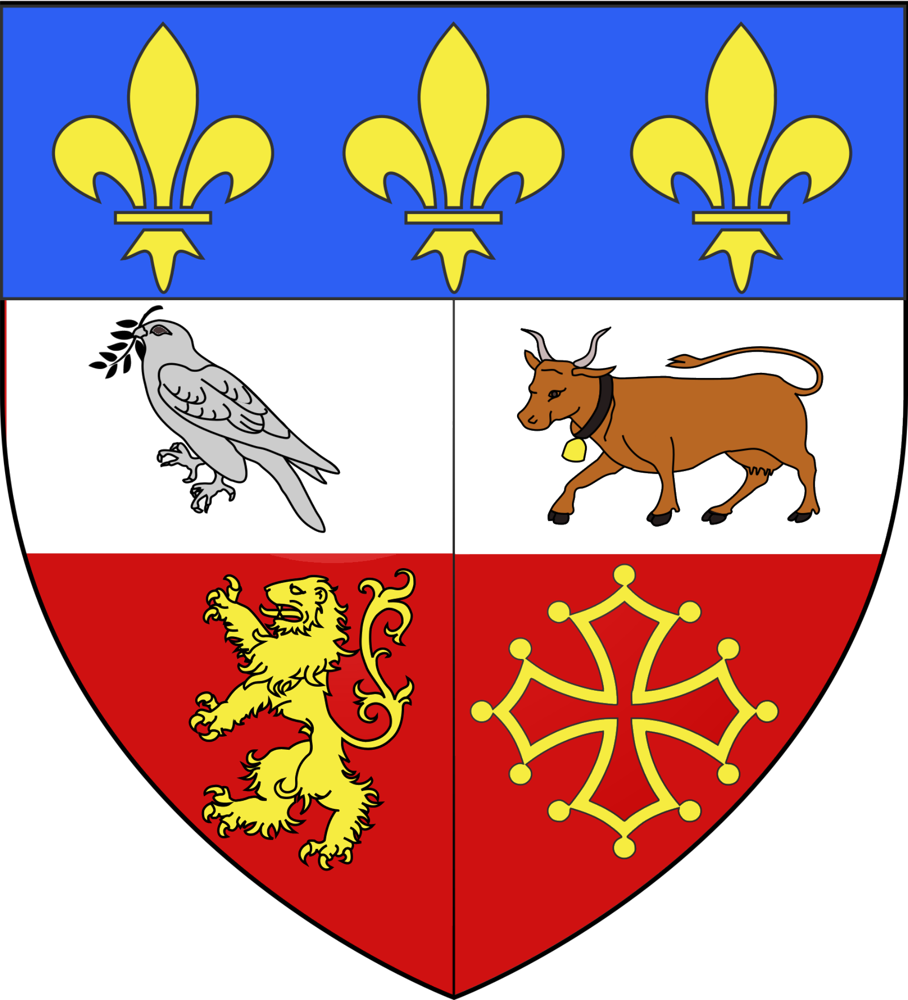 Blason choisi par les élus et les habitants de Toulonjac